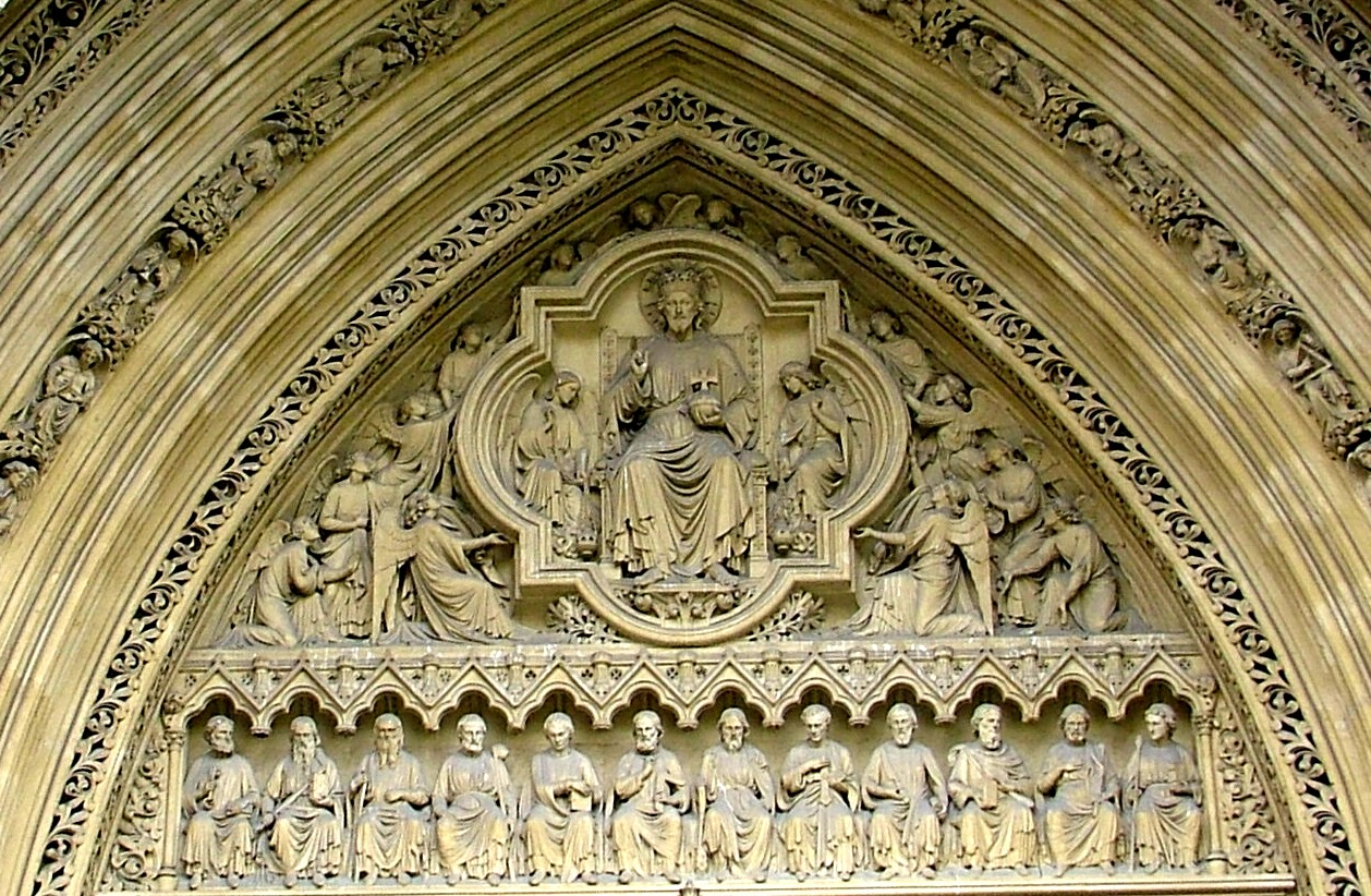 A Westminsteri apátság északi kapubéllete. Koronás Krisztus-triumfál (London, Egyesült Királyság)